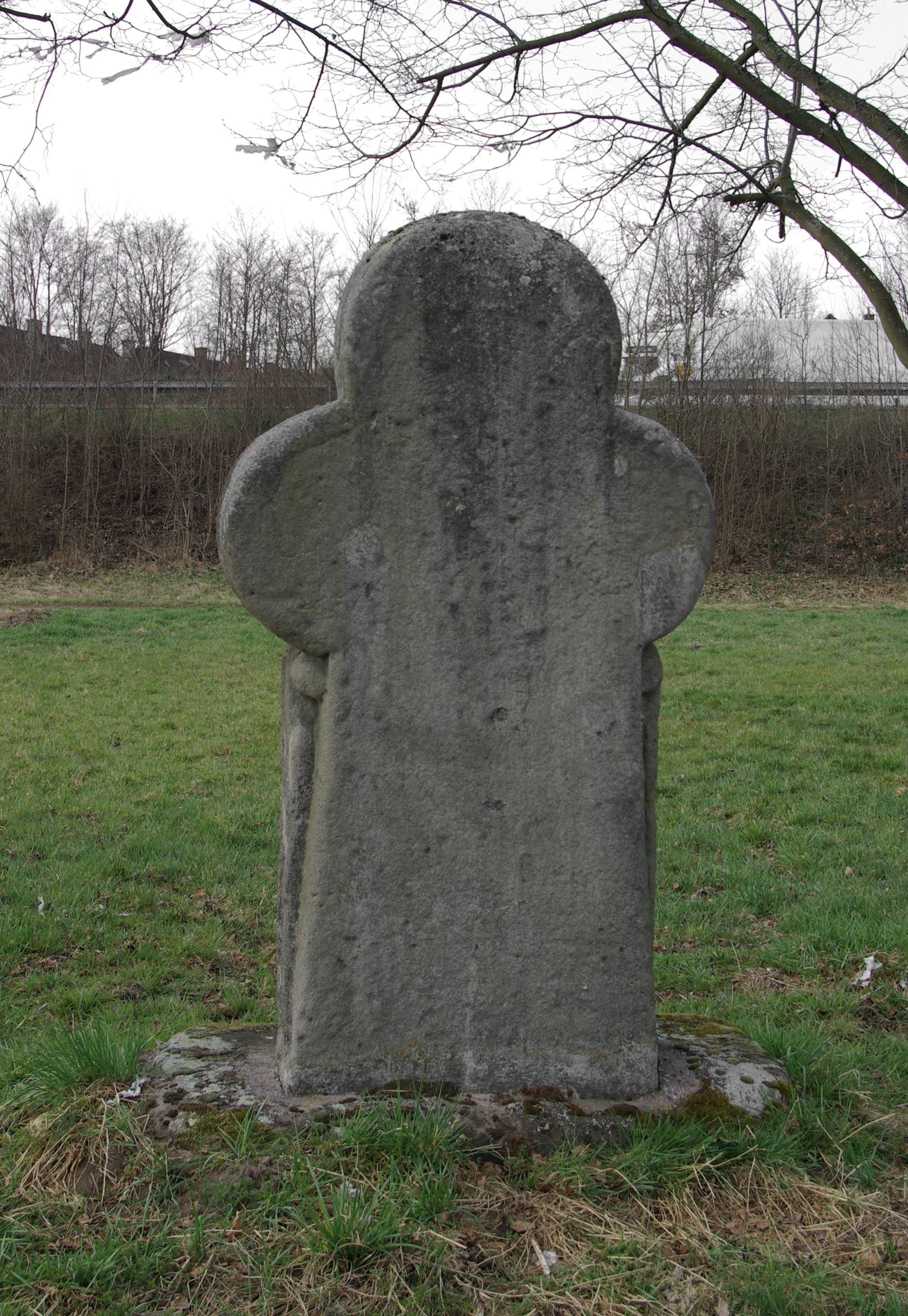 Der Egidienstein, ein mittelalterliches Steinkreuz, im Erlanger Stadtteil Eltersdorf